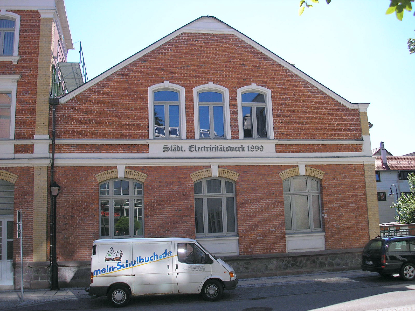 Das alte Elektrizitätswerk der Stadt Ilmenau (Thüringen).